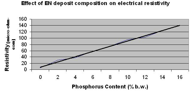 schéma electroless nickel